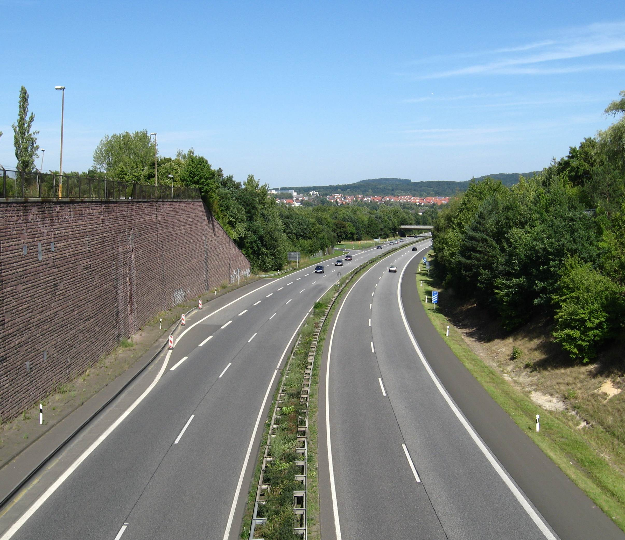 Die Bundesautobahn 485 von der Brücke Rödgener Straße aus Richtung Norden